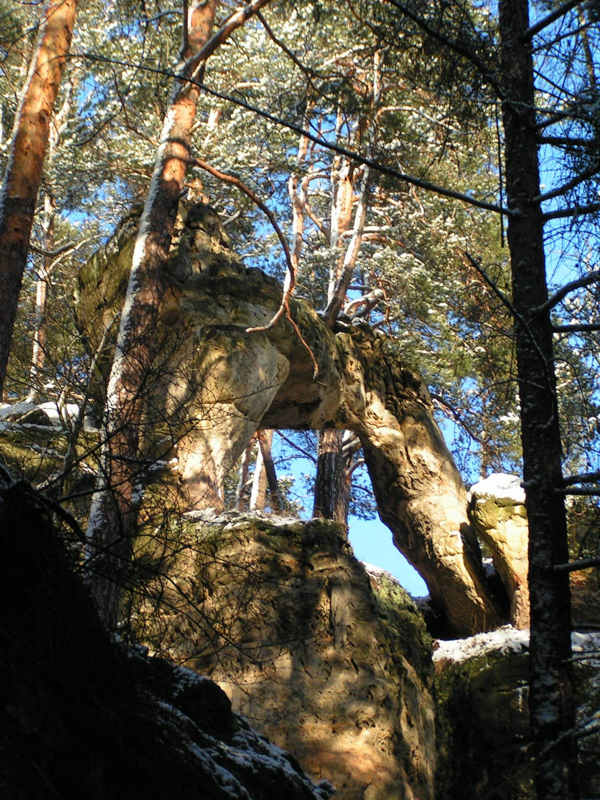 Skalní brána v Hradčanských stěnách, okres Česká Lípa, Czech Republic Jiří Vackář 20:28, 15 May 2006 (UTC)